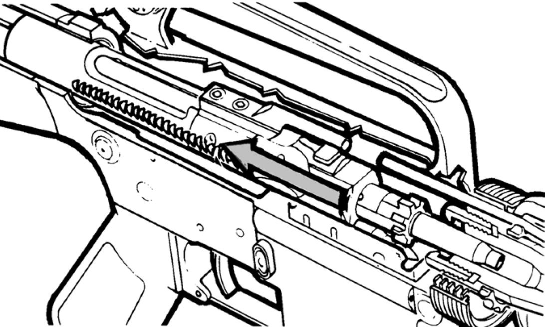 M16 rifle extracting